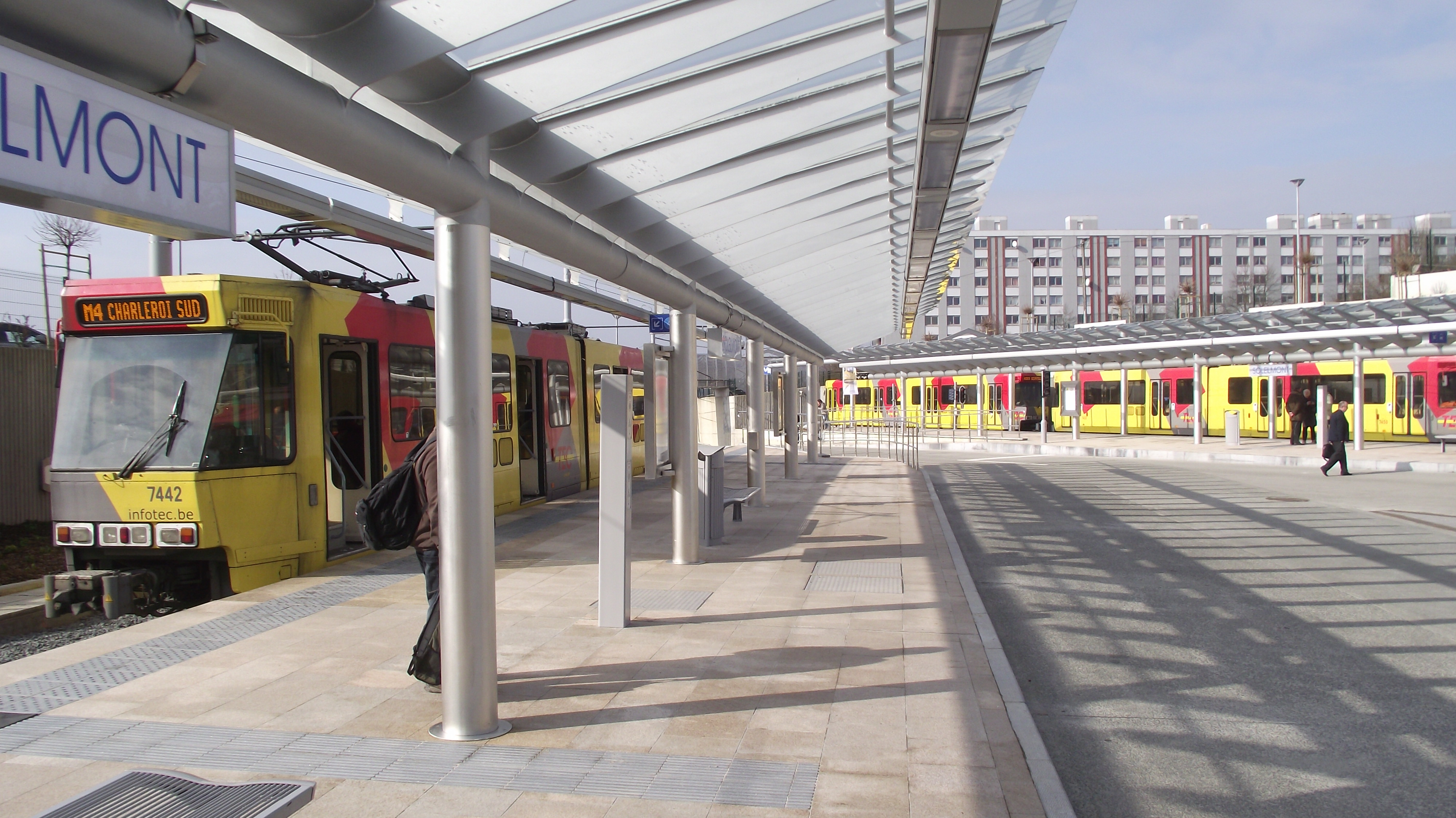 Nieuw eindpunt keerlus Soleilmont geopend op 27-02-2012. Links tram op het vertrekplatform. Op de achtergrond opgestelde trams.